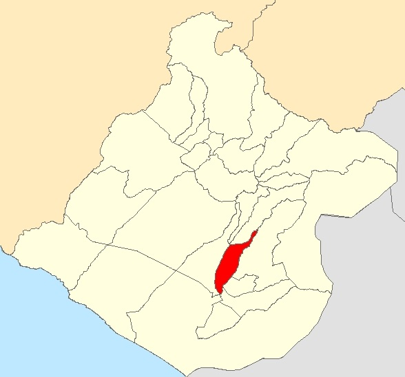 Mapa distrito Ciudad Nueva,Tacna - Perú